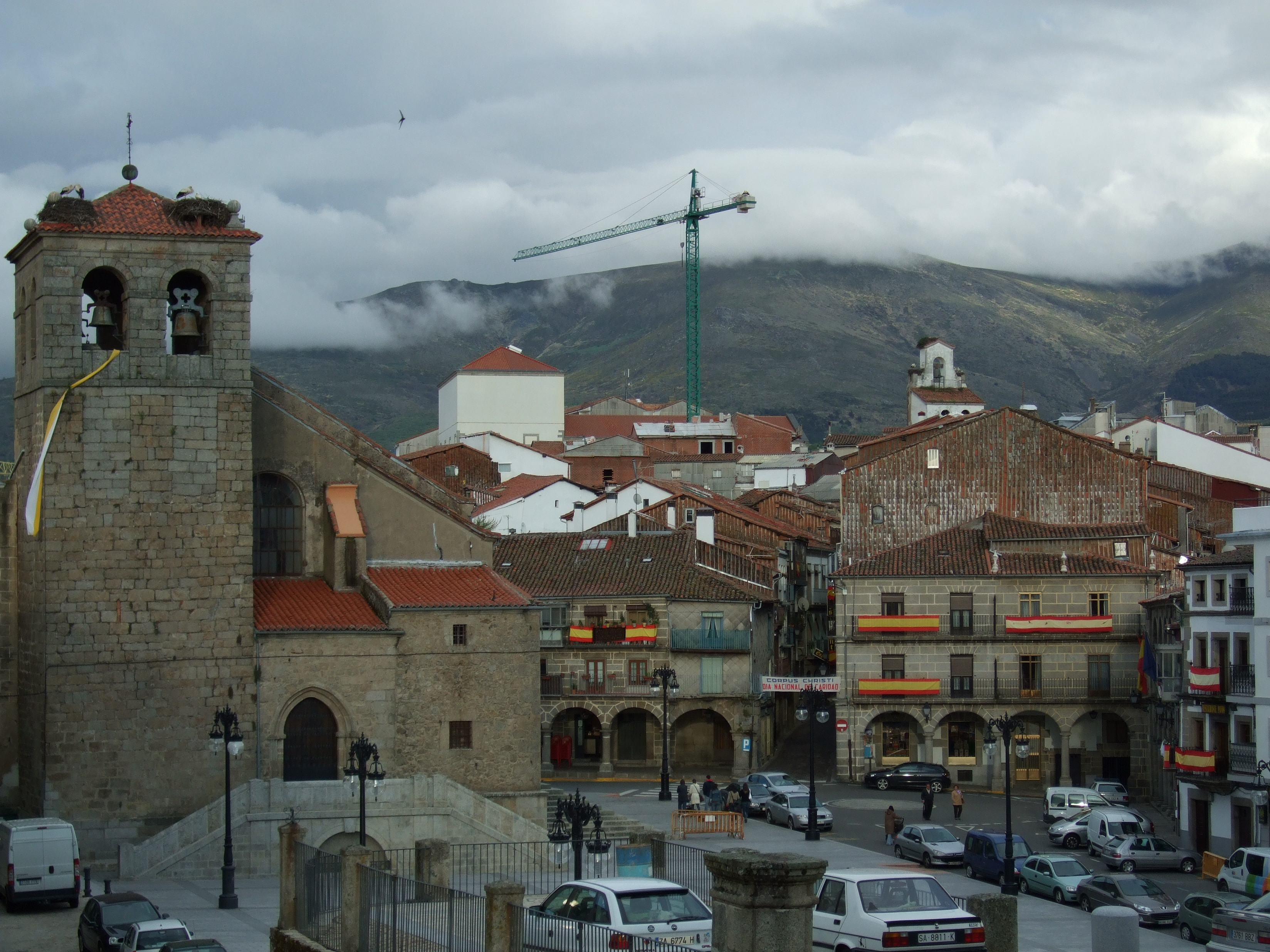 Plaza Mayor de Béjar en el día del corpus en 2008. A la izquierda de la imagen aparece la fachada principal y la torre de la iglesia de El Salvador de Béjar, y a la derecha de la imagen aparece el ayuntamiento de Béjar, adornado con banderas de España.